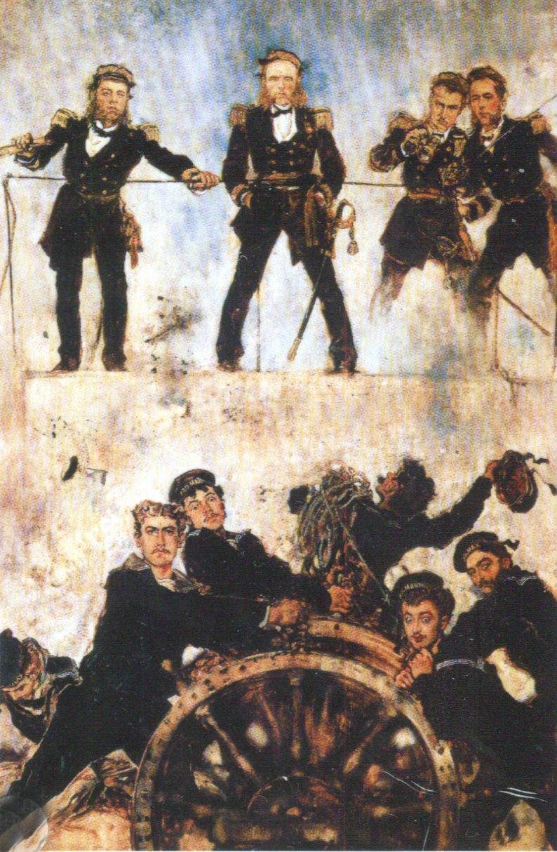 Адмирал Тегетхоф идёт на таран